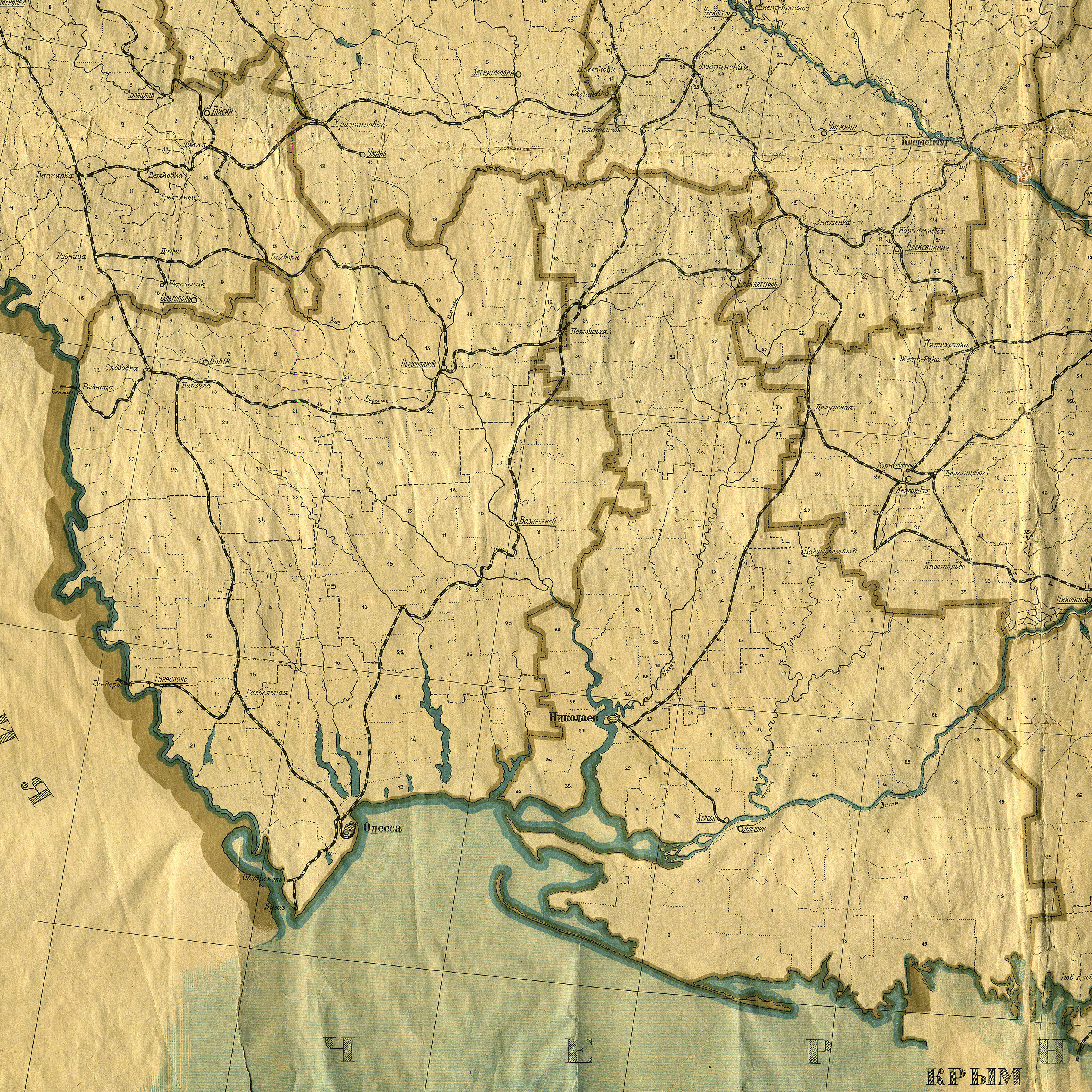 Одеська та Миколаївська губернії, фрагмент мапи Української соц. рад. республіки, 1921